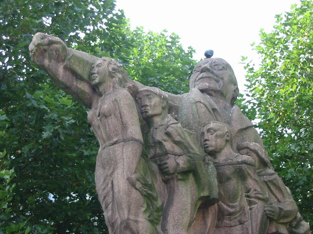 Standbeeld van Edward Anseele op het Frankrijkplein in Gent. Licensing categorie:afbeelding Gent